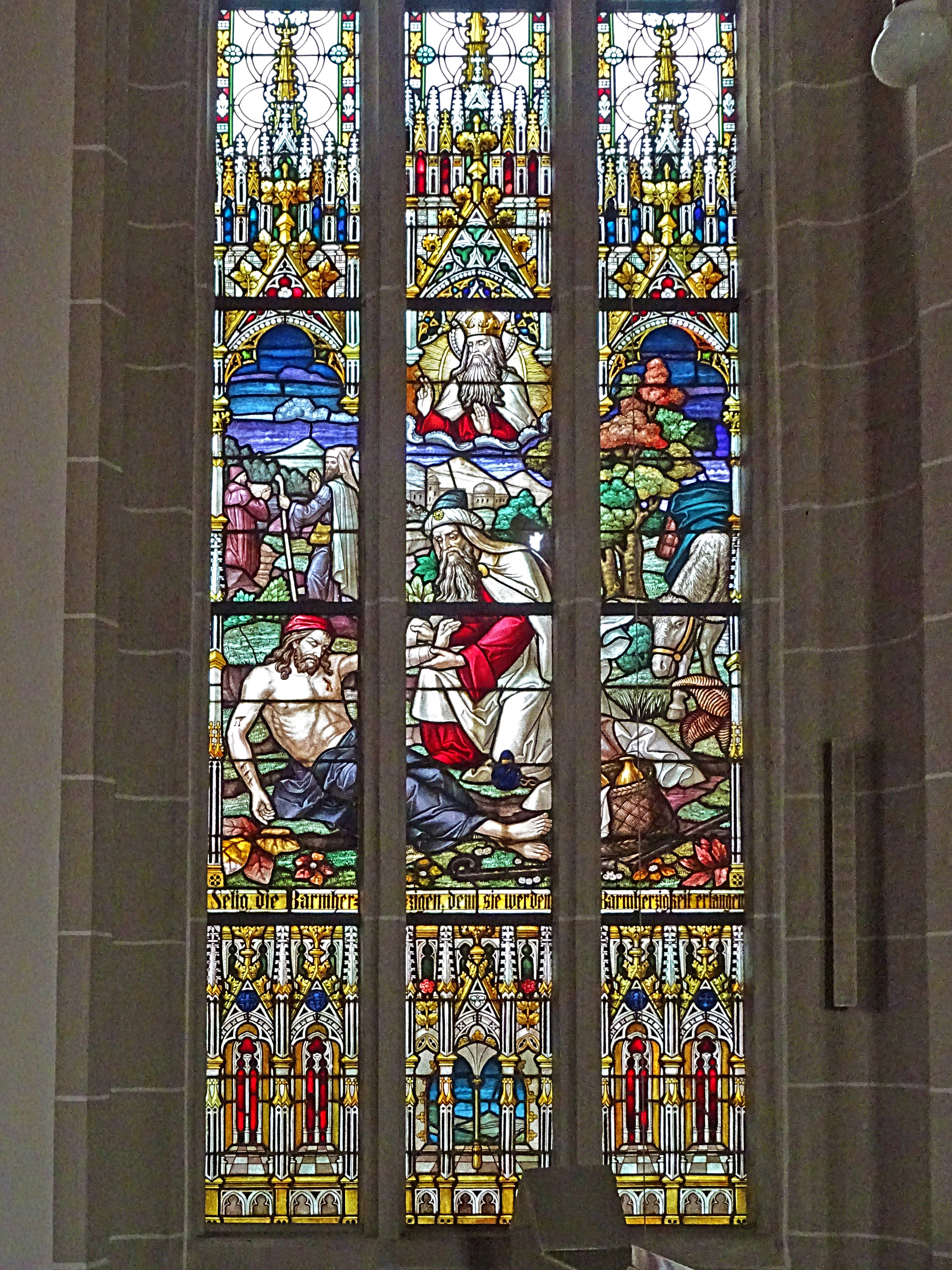 Buntglasfenster in der Pfarrkirche St. Gertrud (Dingelstädt) 5. Selig sind die Barmherzigen, denn sie werden Erbarmen finden / Der barmherzige Samariter